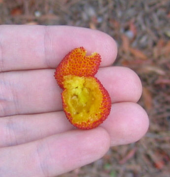 Aufgetrennte Frucht des Erdbeerbaumes